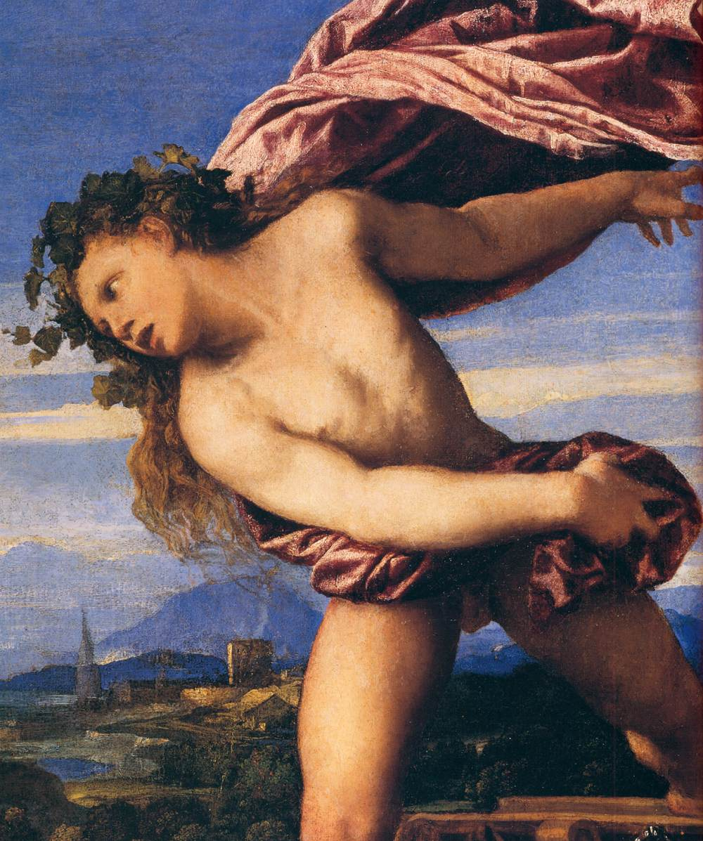 detail